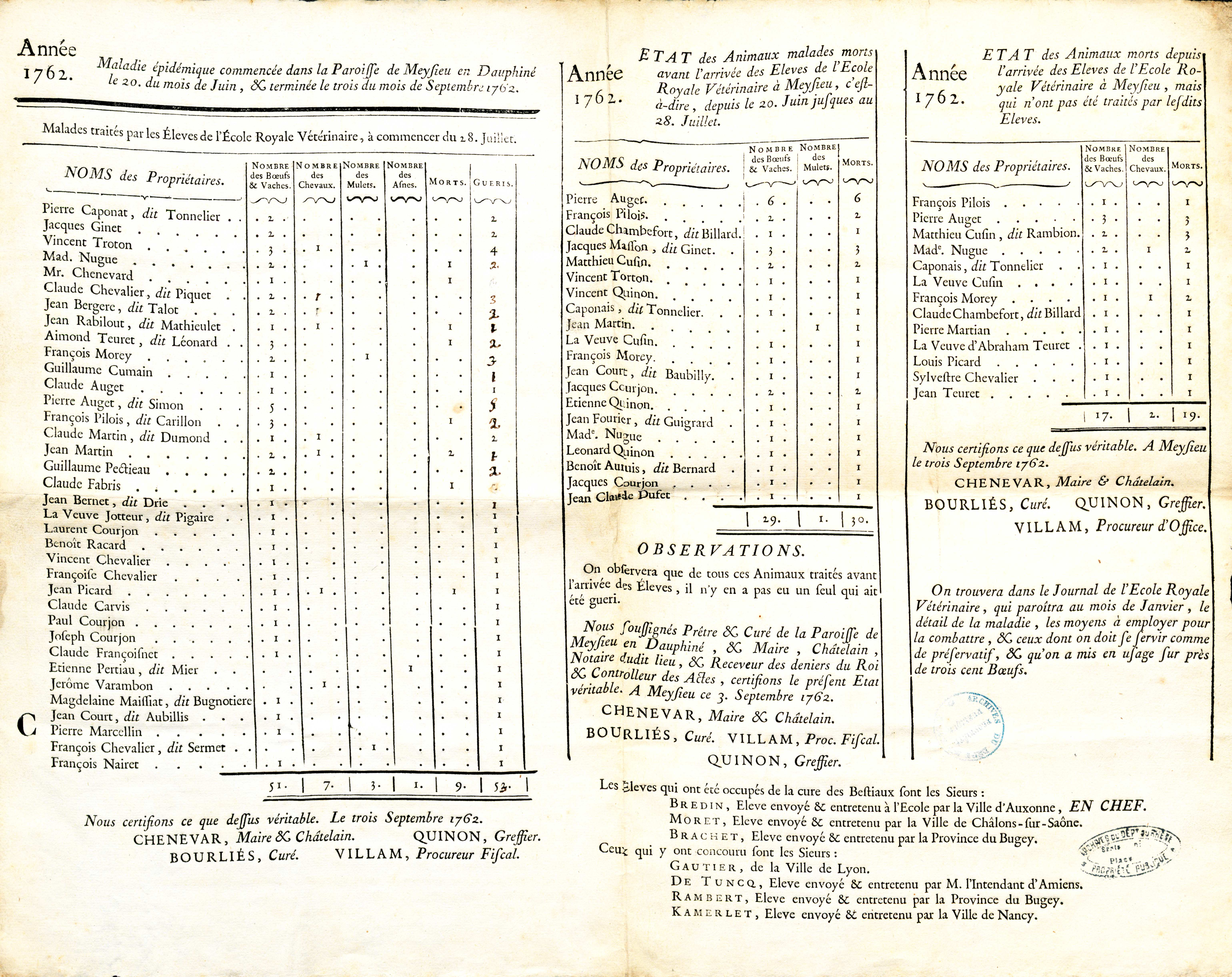 ADRML, 1 C 197